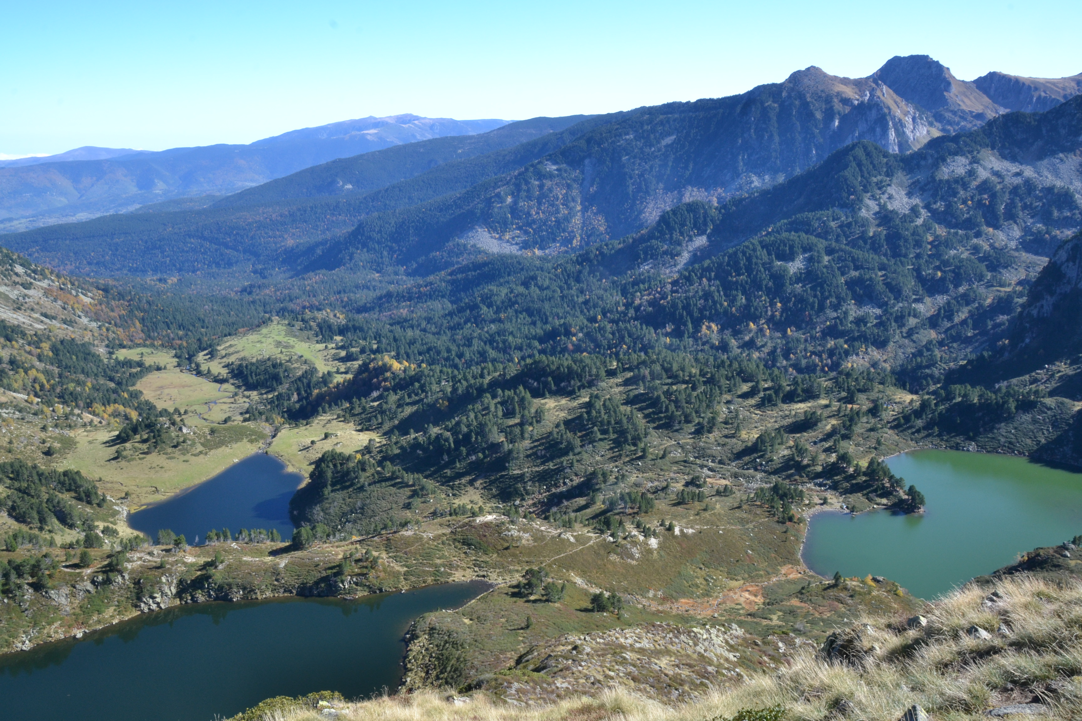 Vue sur trois des étangs de Rabassoles (Ariège, France).